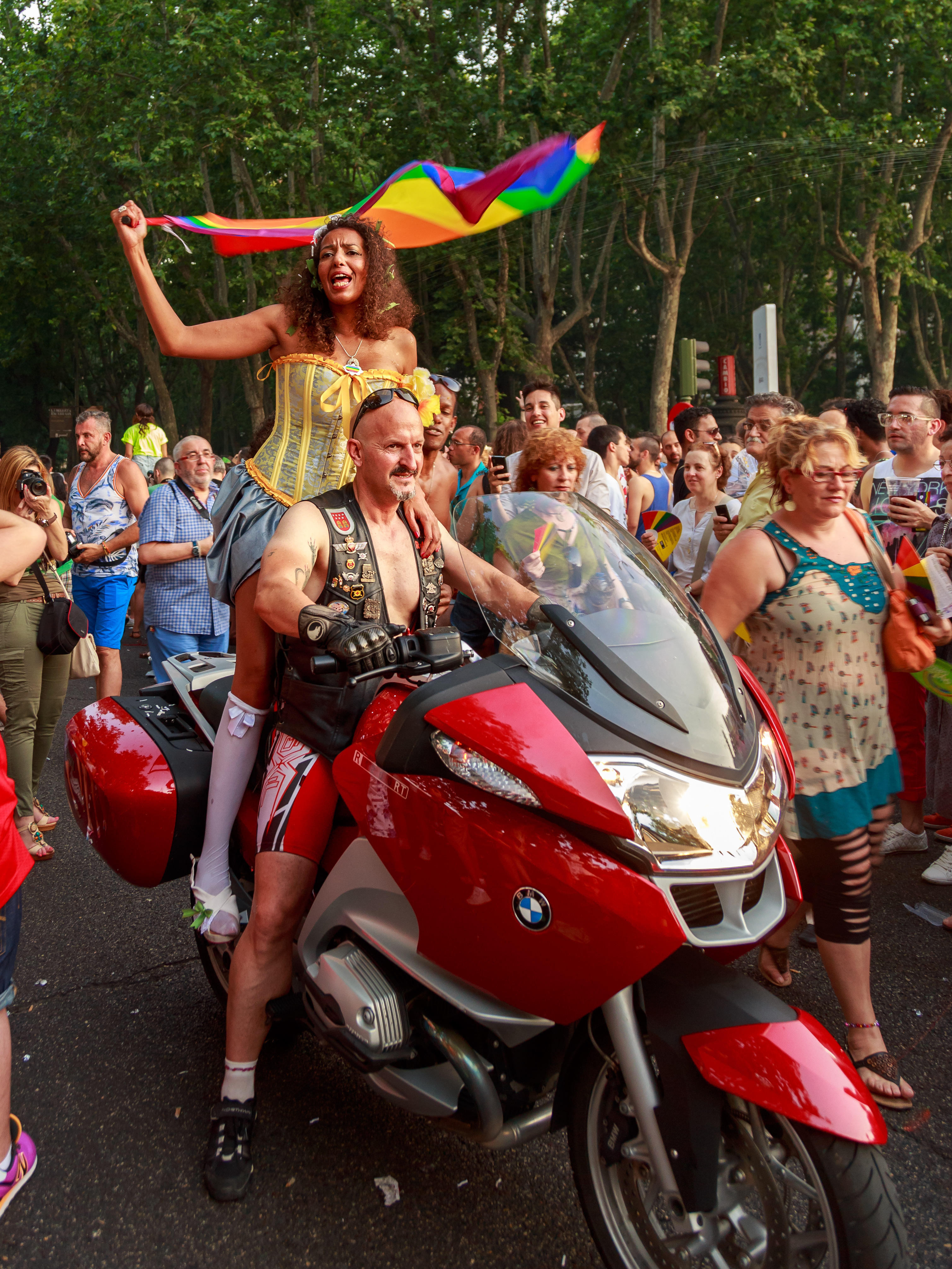 Gay Pride Madrid in 2013.